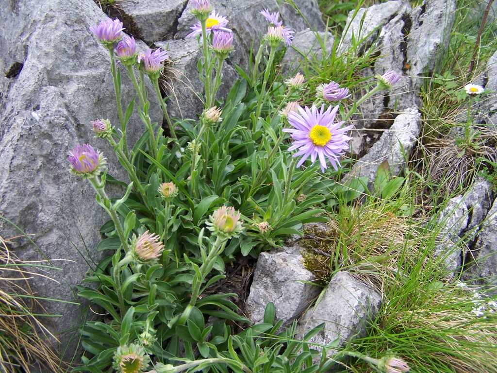 Aster alpinus (pl. aster alpejski), Tatra Mountains - Hala Upłaz